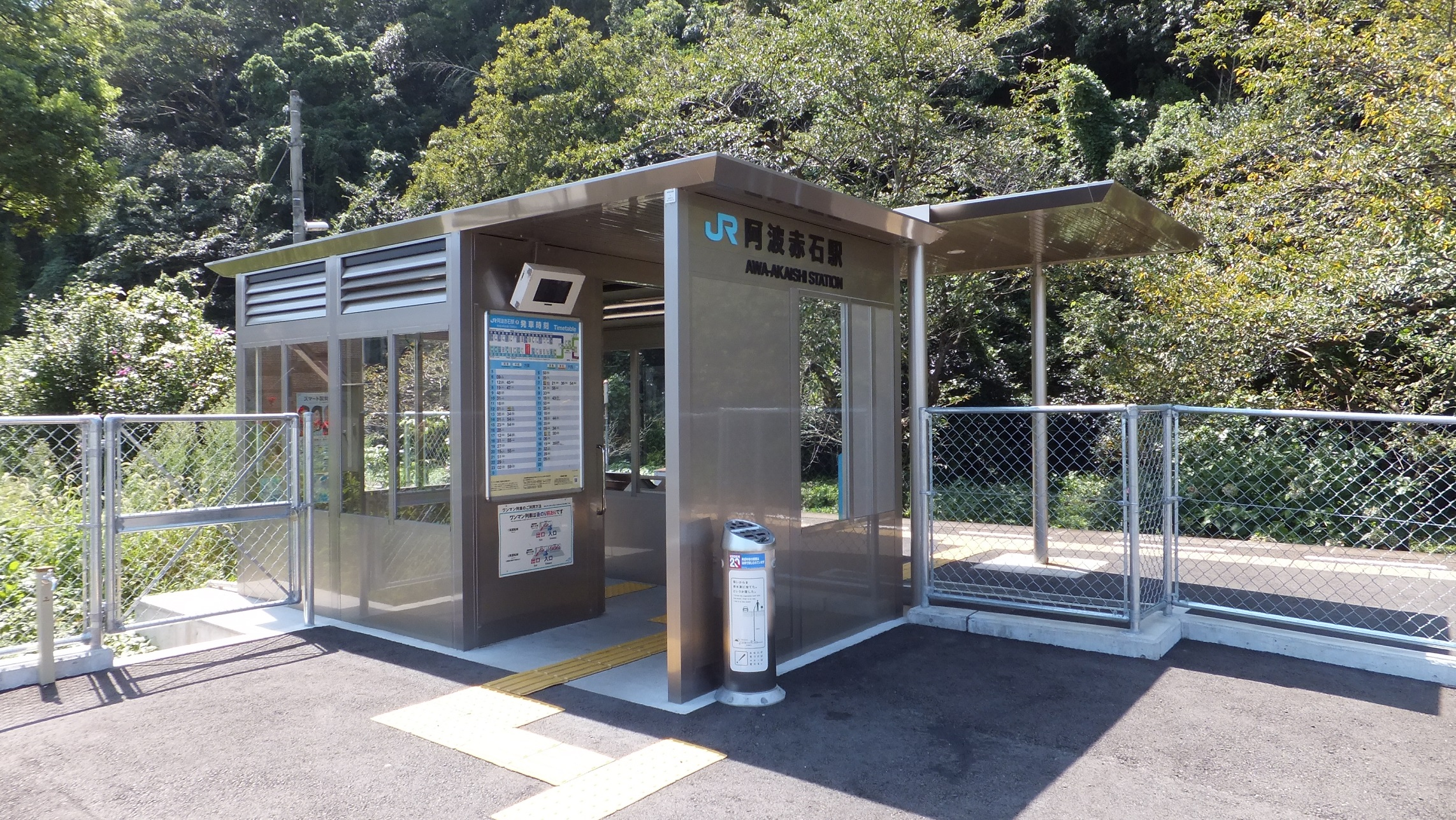 JR牟岐線 阿波赤石駅 待合所 （徳島県小松島市 2015年）